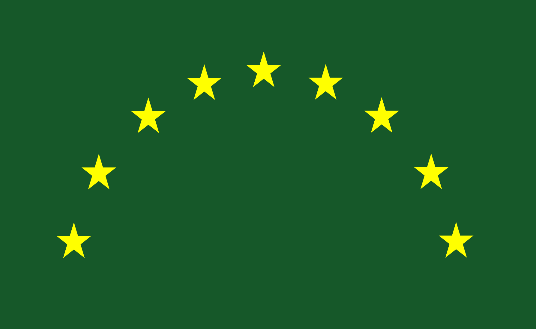 Bandera Color original del Municipio de Cienaga de Oro